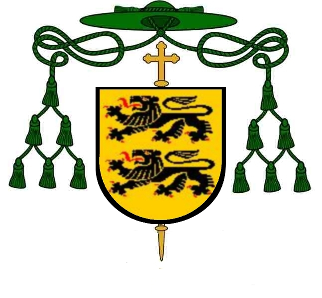 Wappen Eduard Graf O’Rourke 1876-1943 Bischof von Riga (1918-1920), Administrator und Bischof von Danzig (1922-1938)